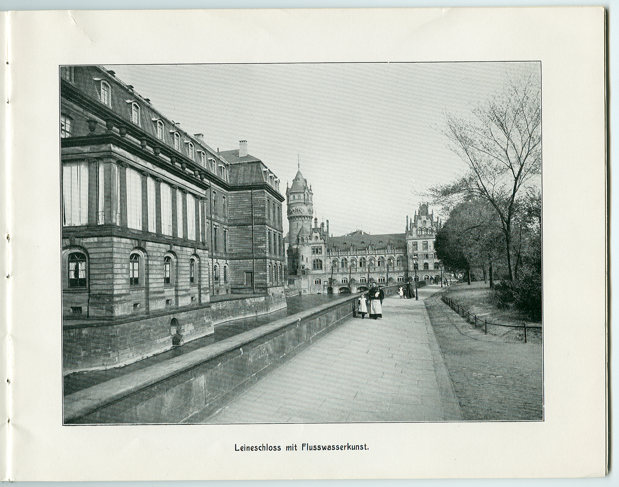 „Hannover – 26 Ansichten nach künstlerischen Aufnahmen“ von Karl F. Wunder. – Leineschloss mit Flusswasserkunst.